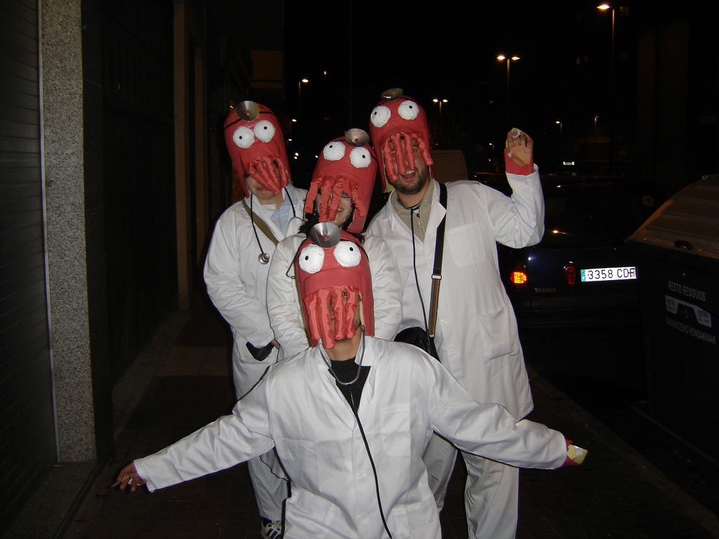 3 mennesker klædt ud som figuren zoidberg.